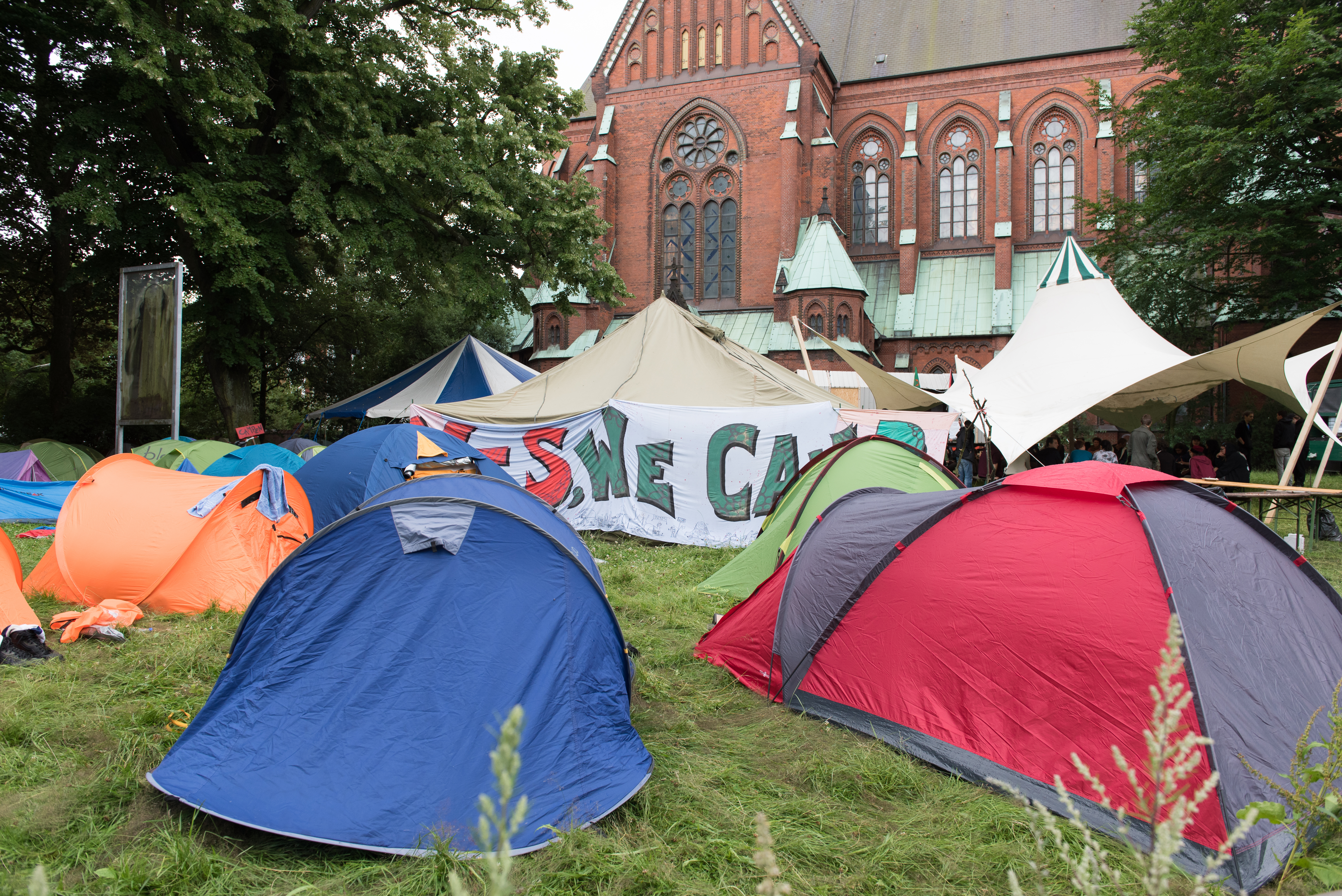 G-20 Protestcamp vor der St. Johanniskirche in Hamburg Altona